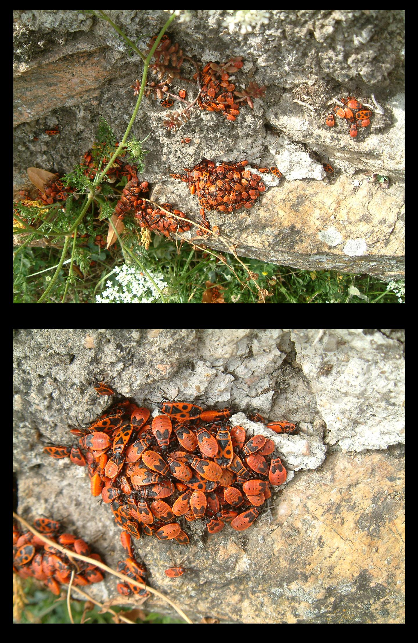 Groupe de gendarmes.